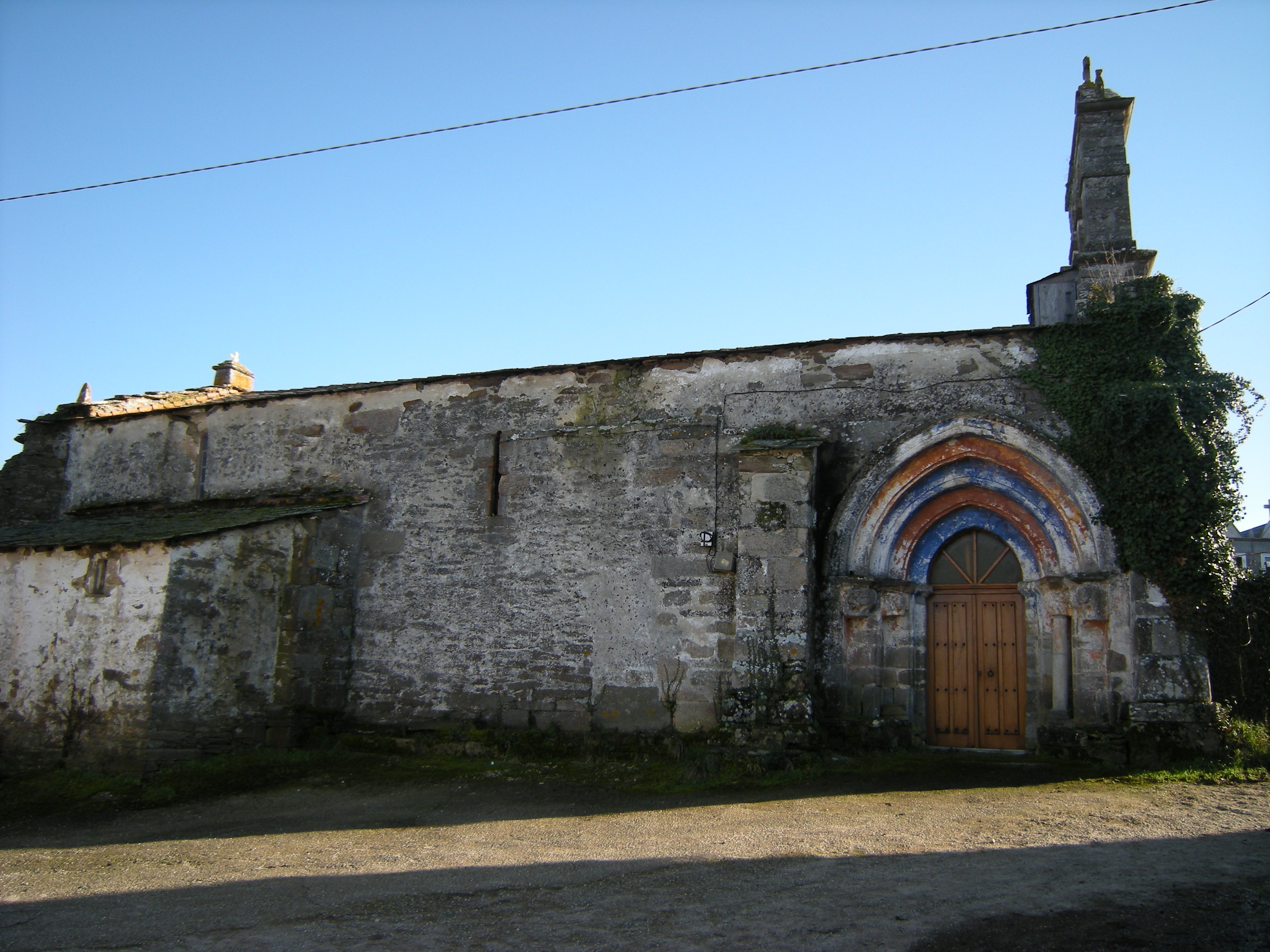 Igrexa de San Pedro de Valverde, Monforte de Lemos